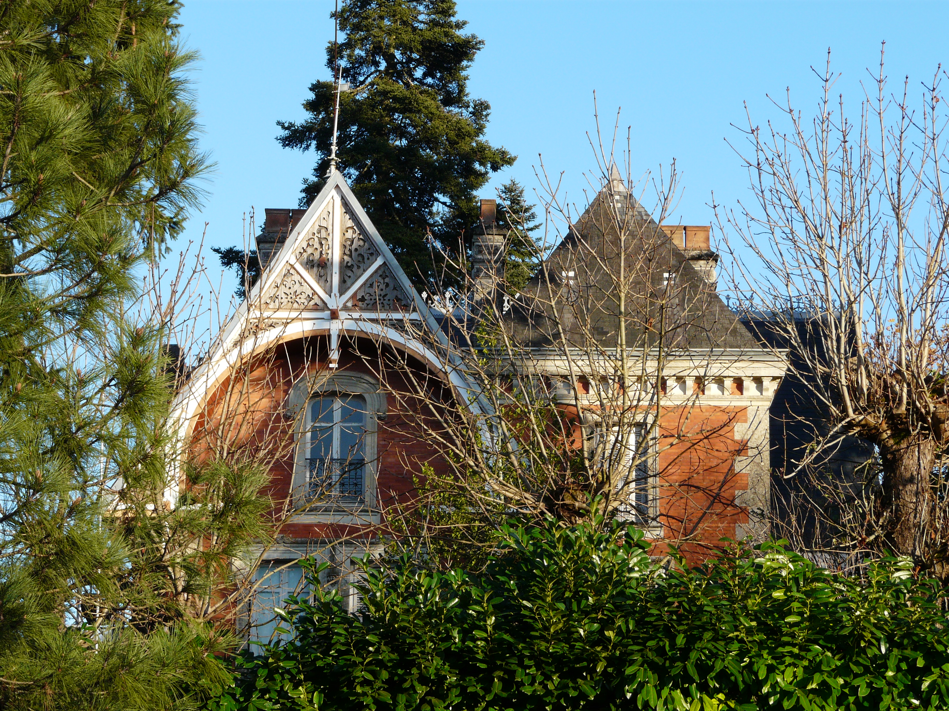 Le château de Marsac, Marsac-sur-l'Isle, Dordogne, France